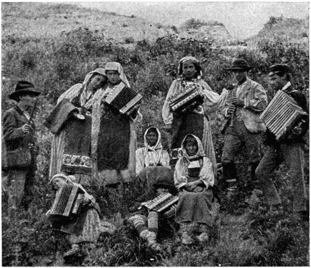 zingari italiens se rendant en espagne